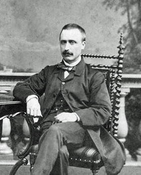 Portret van Theodorus Pieter Viruly (1822-1902)